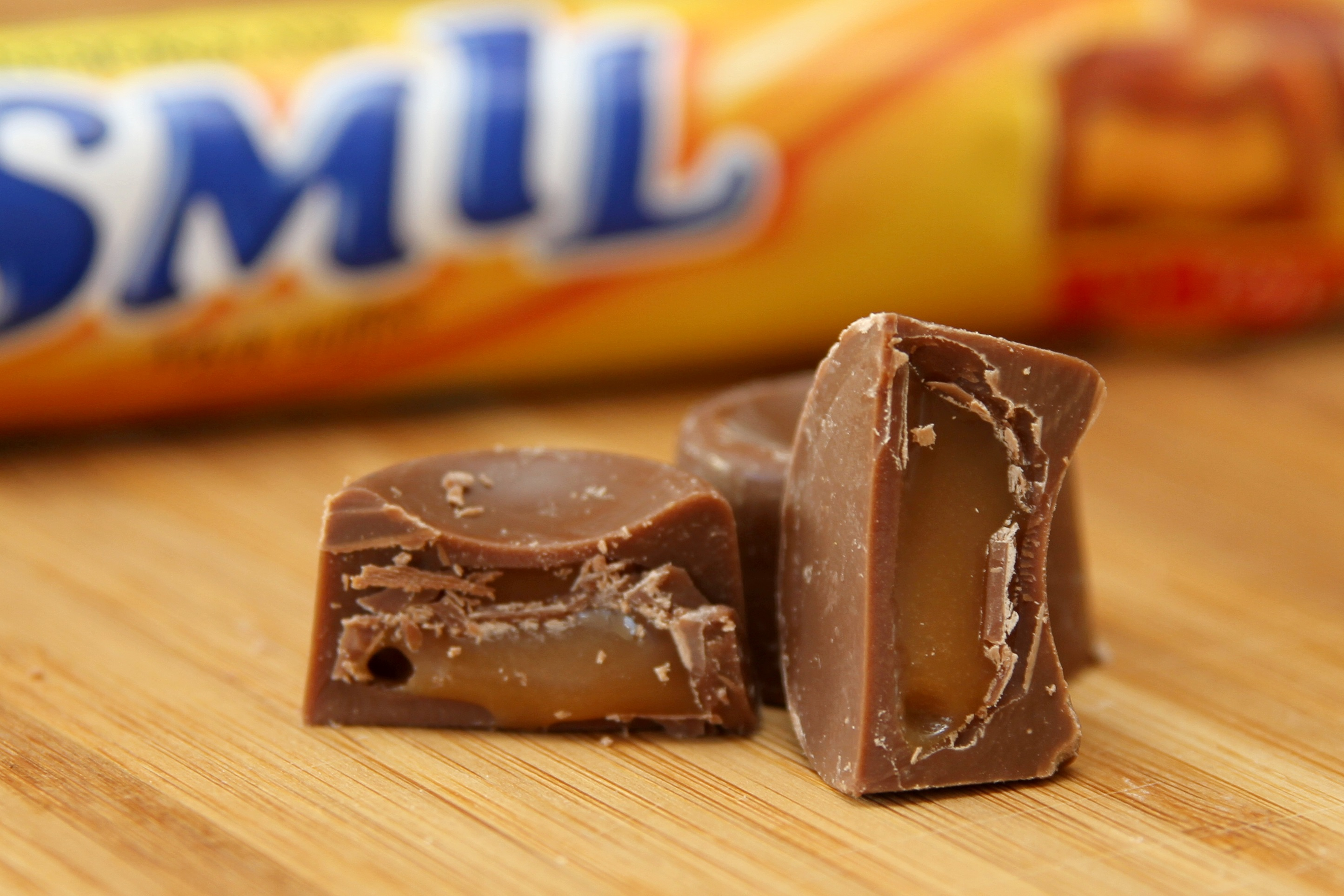 Sjokoladen Smil.